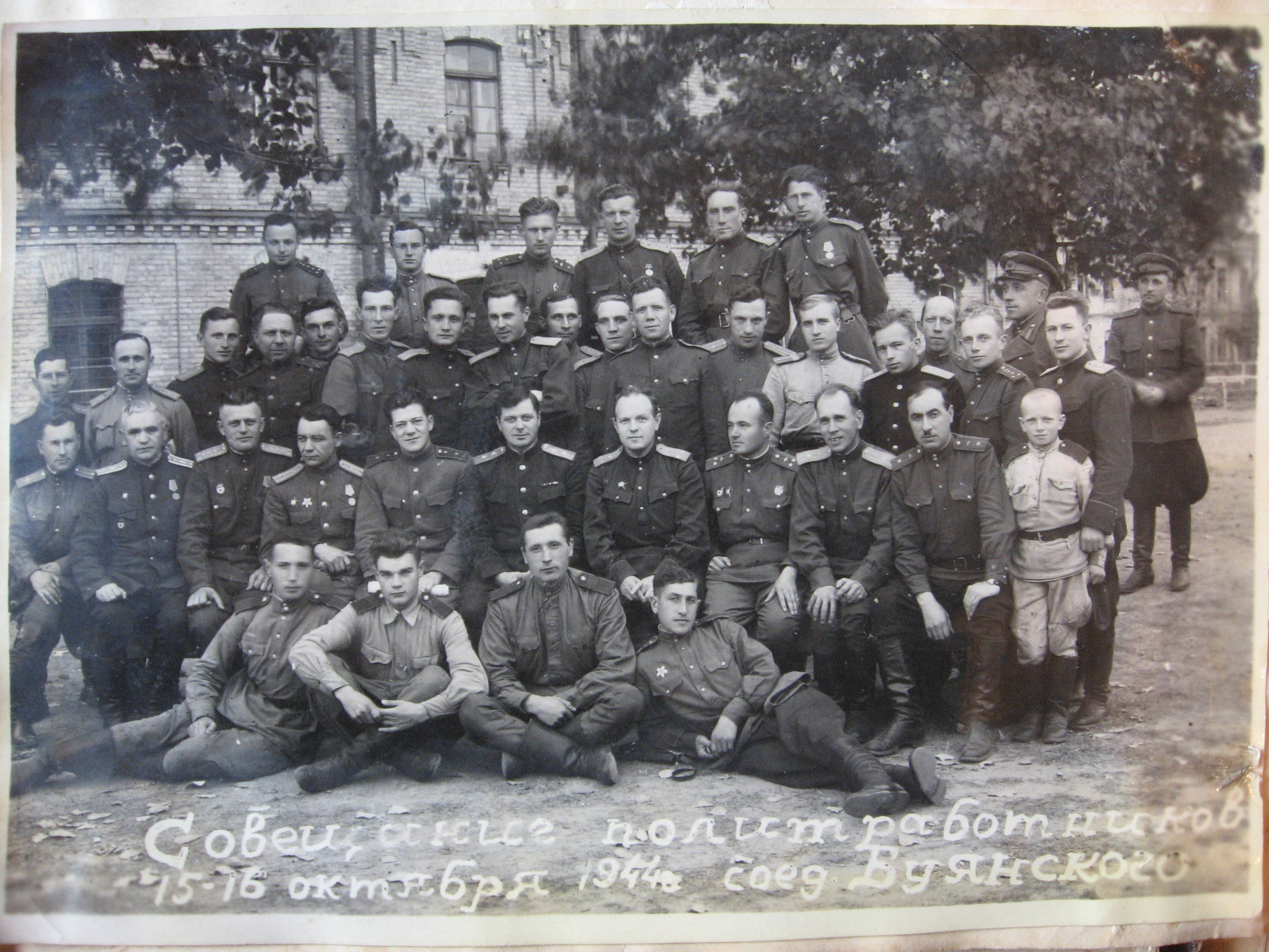 Николай Буянский, 1944 (совещание политработников 15-16 октября). Групповое фото.